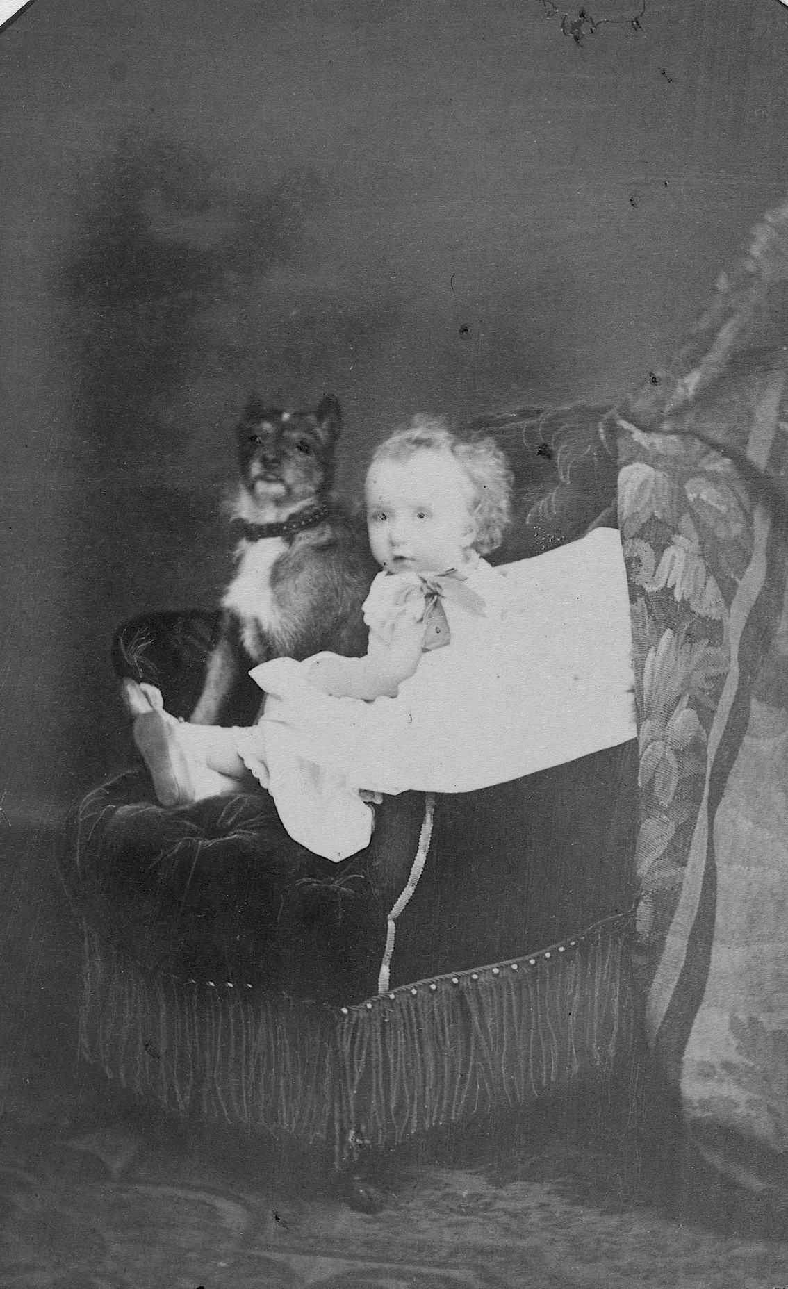 Henriette de Belgique.